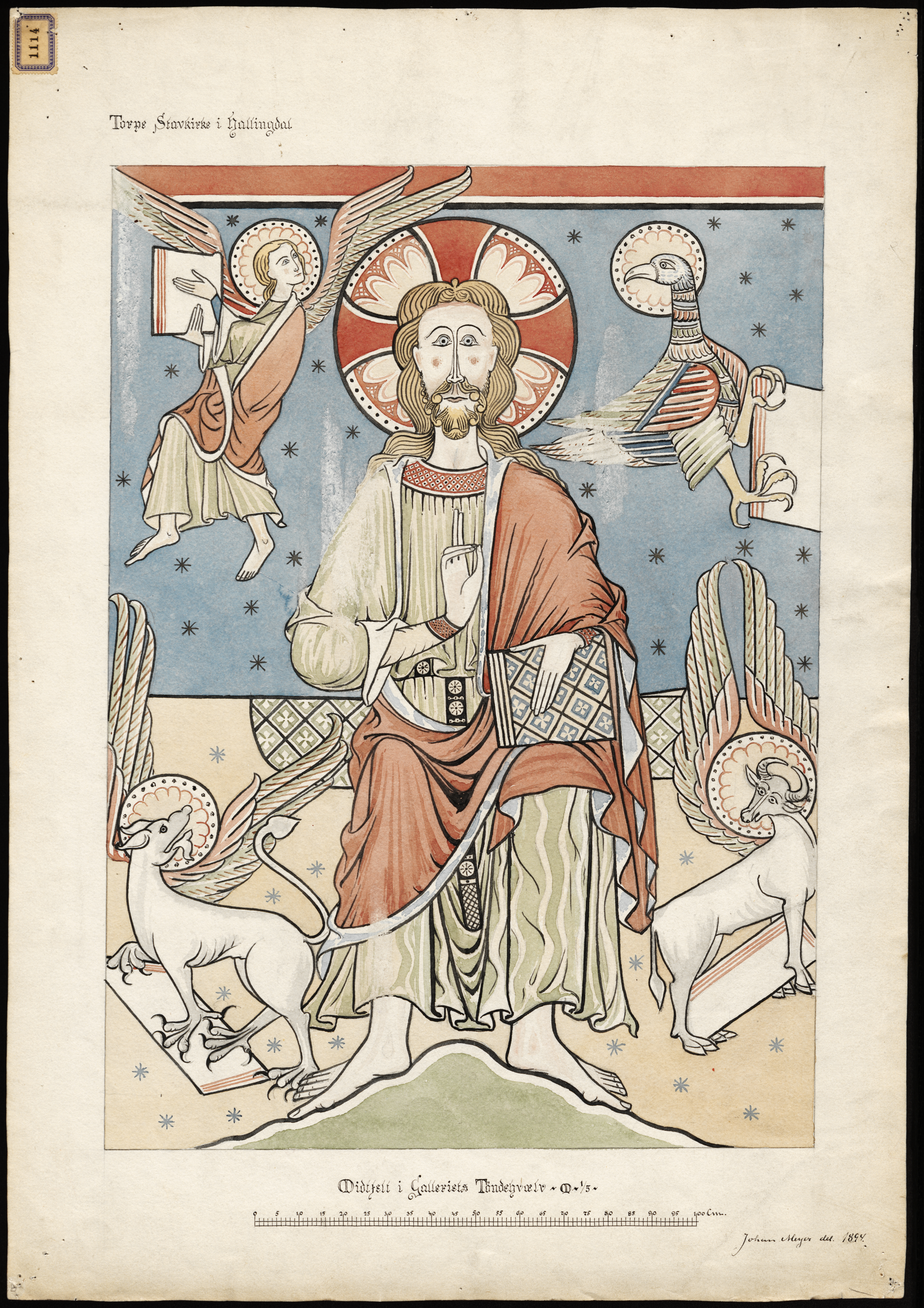 Bildet er hentet fra Riksantikvaren. Midtfelt i galleriets tønnehvelv Eier : Fortidsminneforeningen Sted : Norway, Buskerud, Ål Emneord: STAVKIRKER Medium : Akvarell